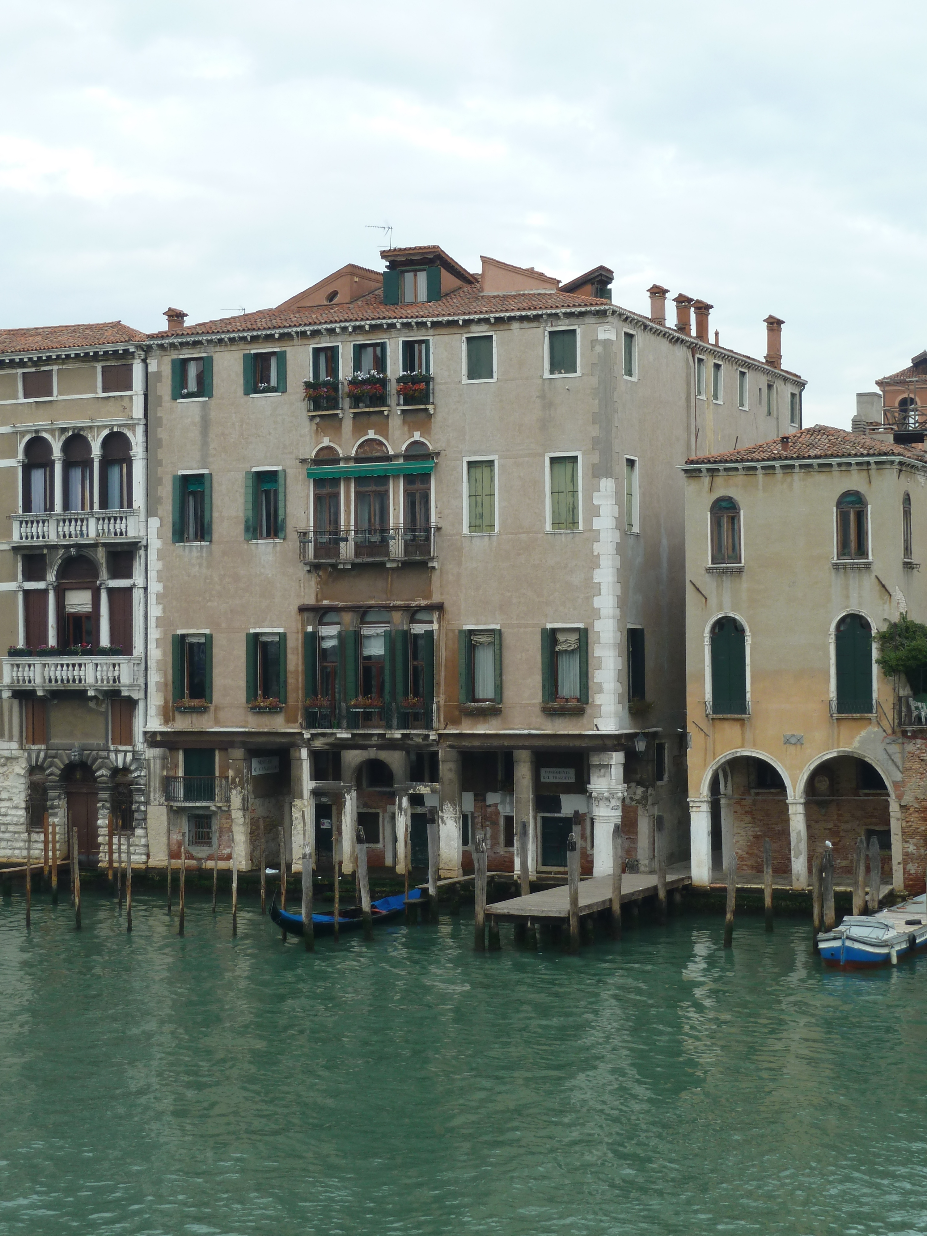 Palazzo Contarini Pisani (Venice)